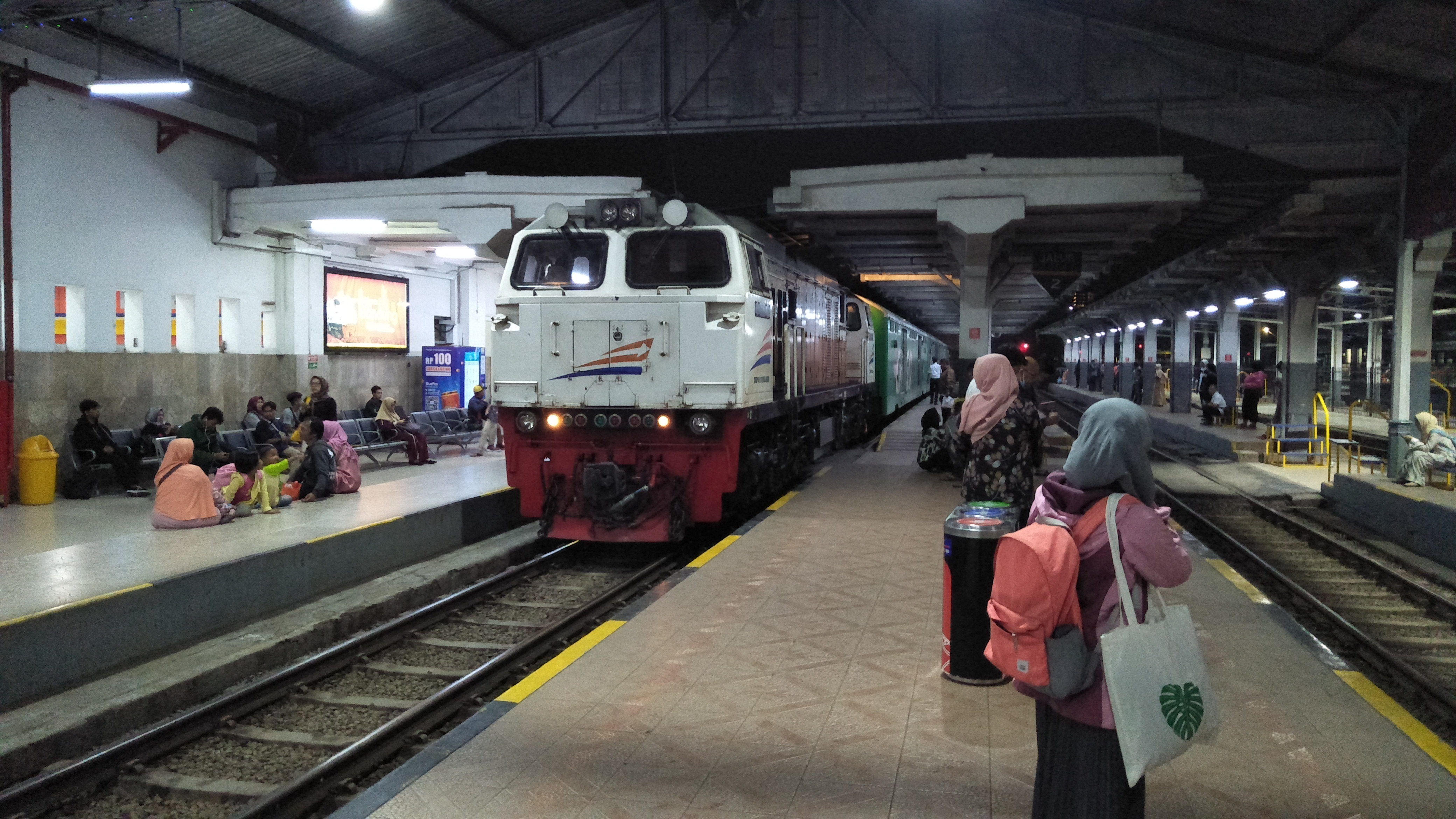 KA Parcel di stasiun Bandung